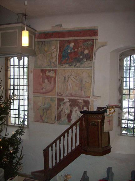 Wandbilder und Kanzel der Kirche Fördergersdorf